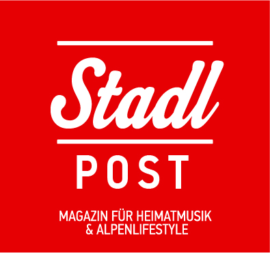 Logo der Stadlpost